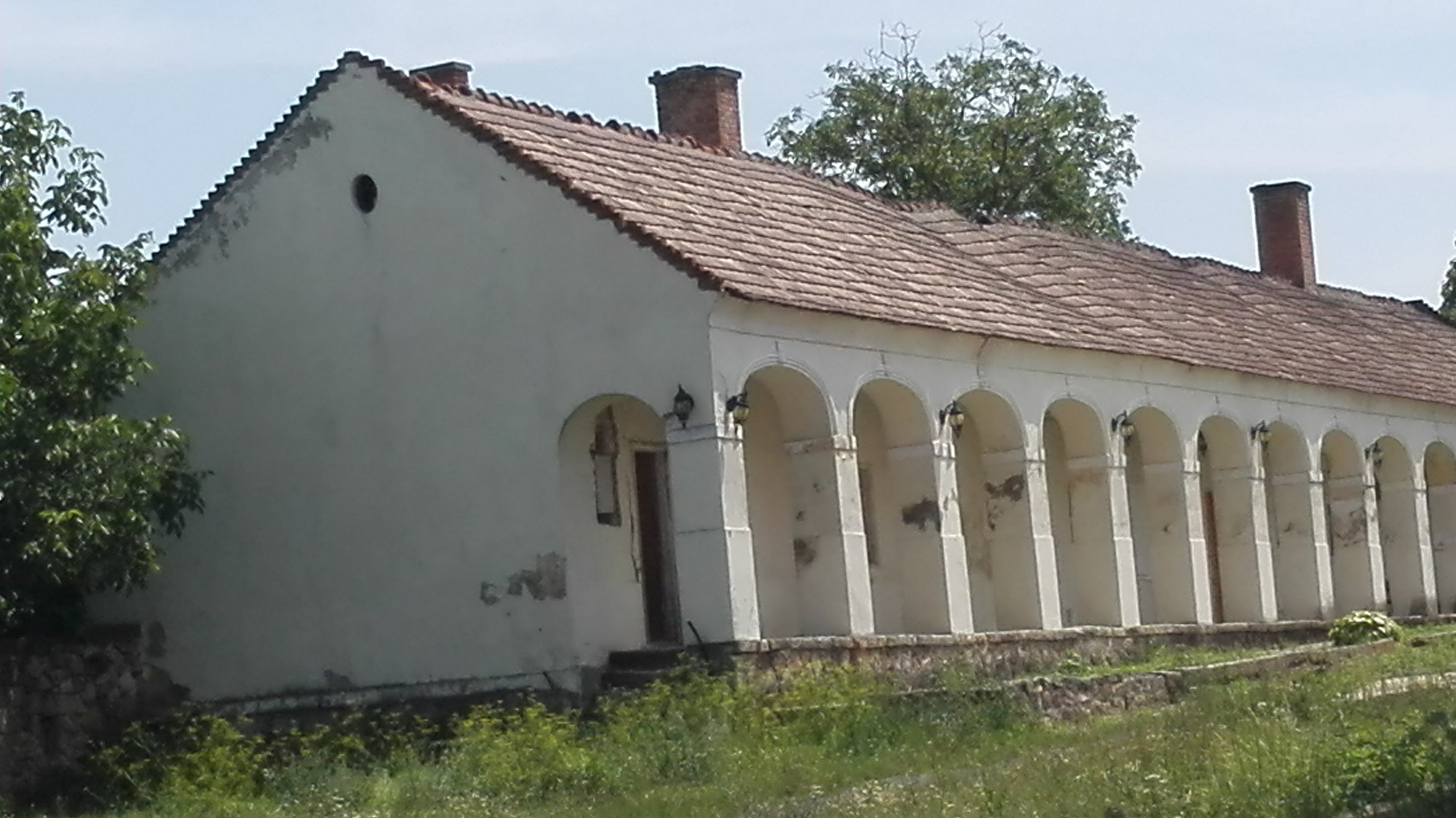 Monaky-kastély, Monok, Gazdasági épület